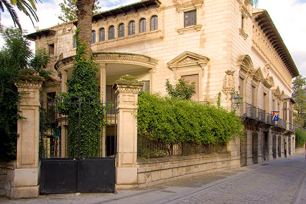 Palacio de Ruvalcaba.